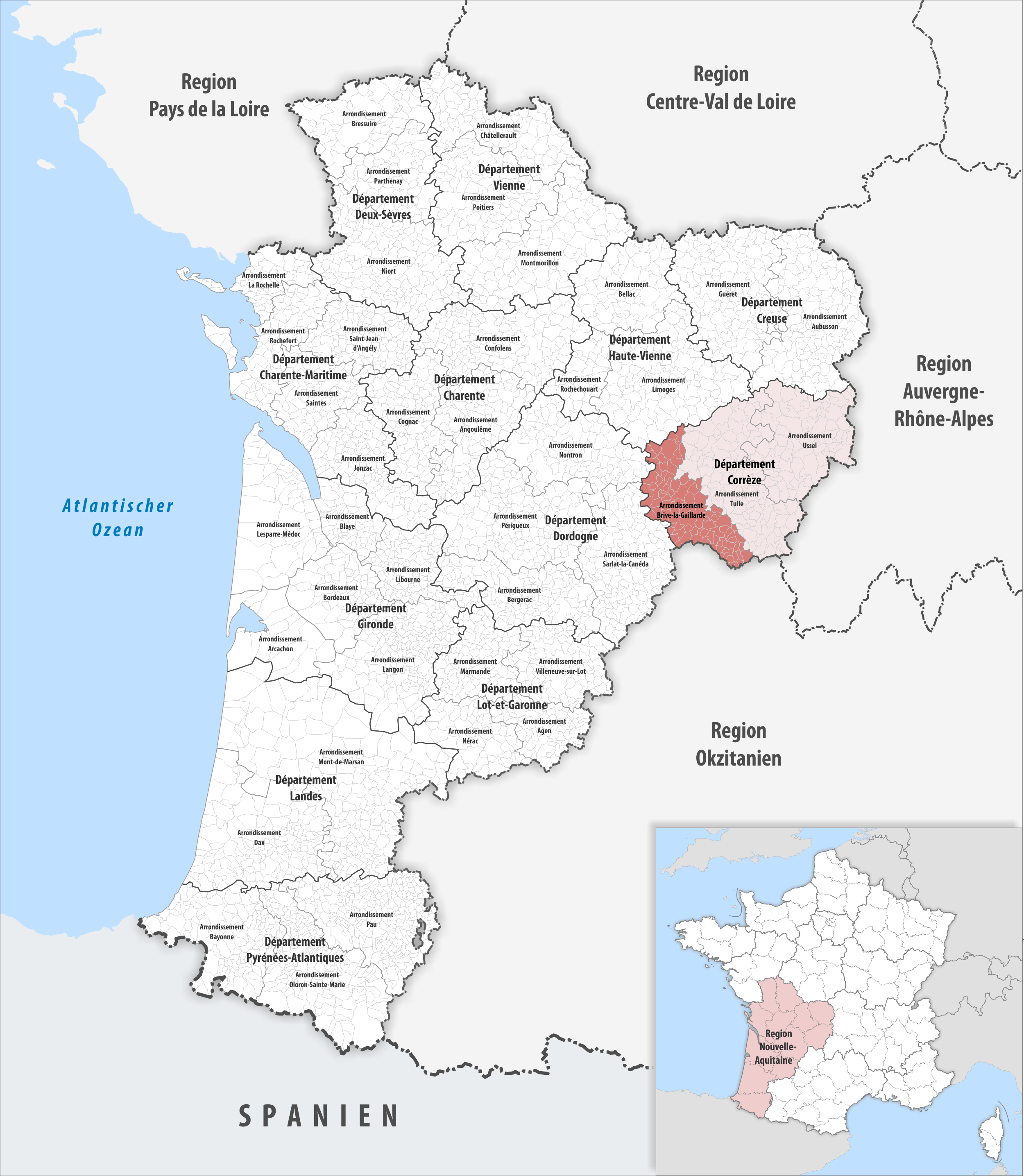 Lage des Arrondissements Brive-la-Gaillarde